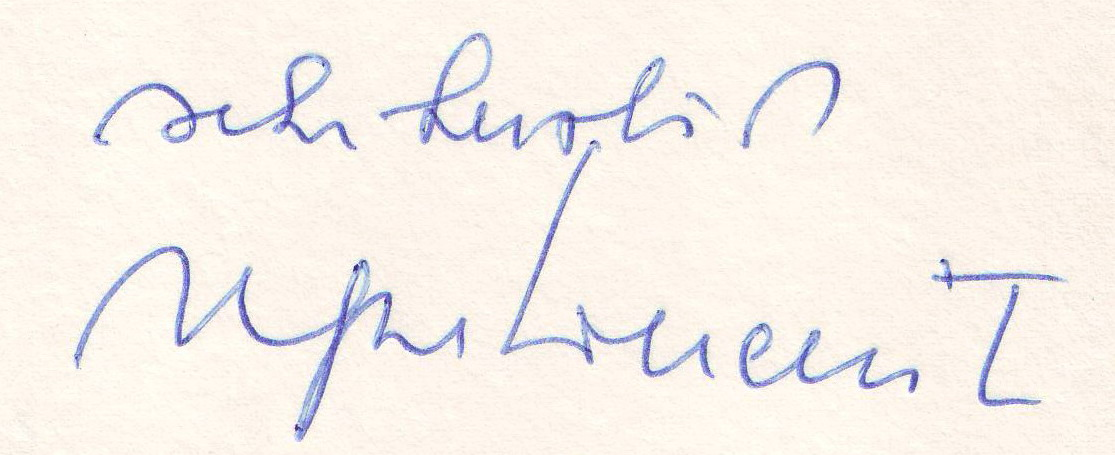 Widmung Alfred Kolleritsch, Dezember 1992; Widmung des Buches: Alfred Kolleritsch, Hemler der Vogel - Mit Zeichnungen von Hartmut Urban, Literaturverlag Droschl, Graz 1992